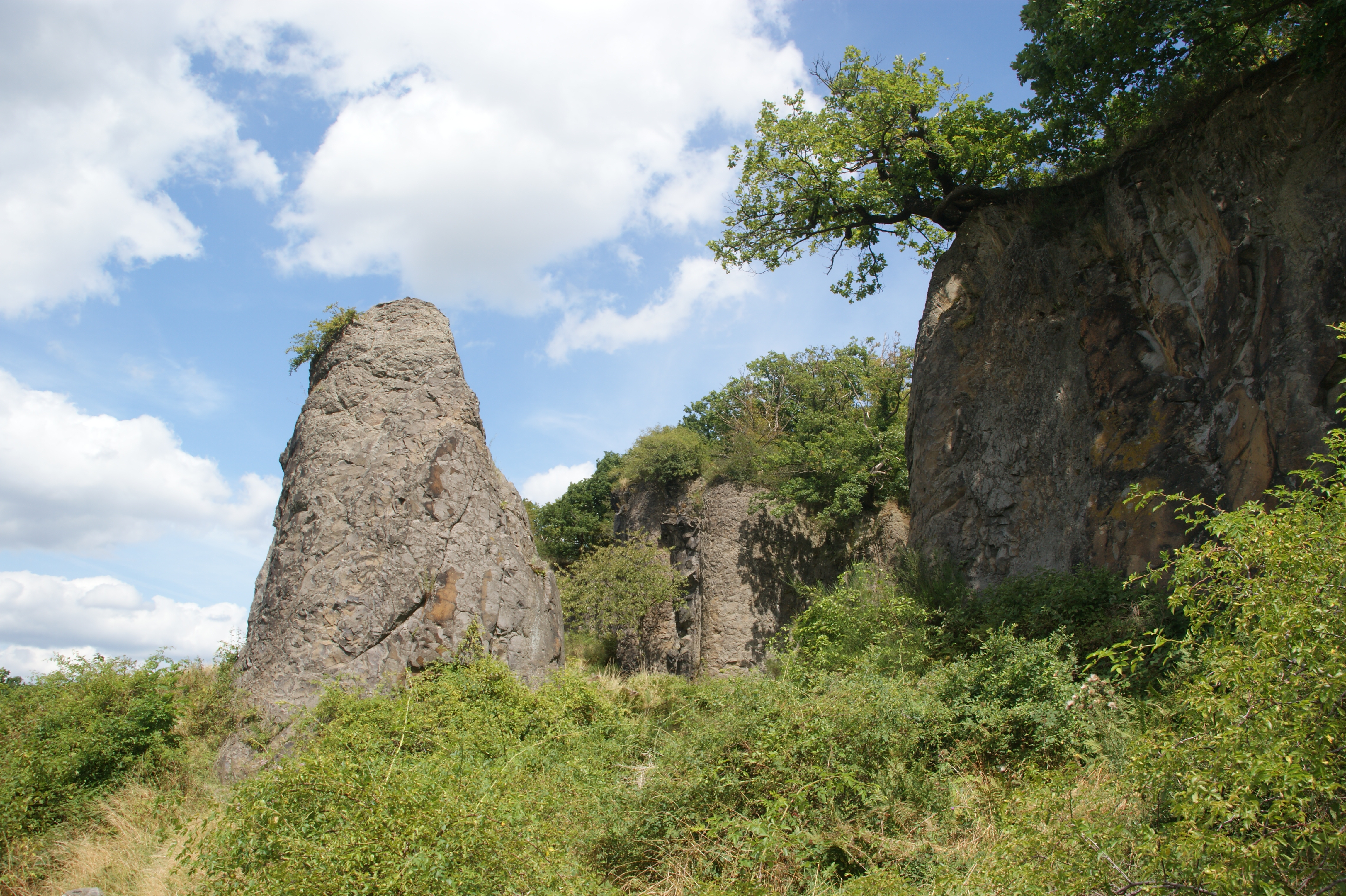 Stenzelberg im Naturpark Siebengebirge